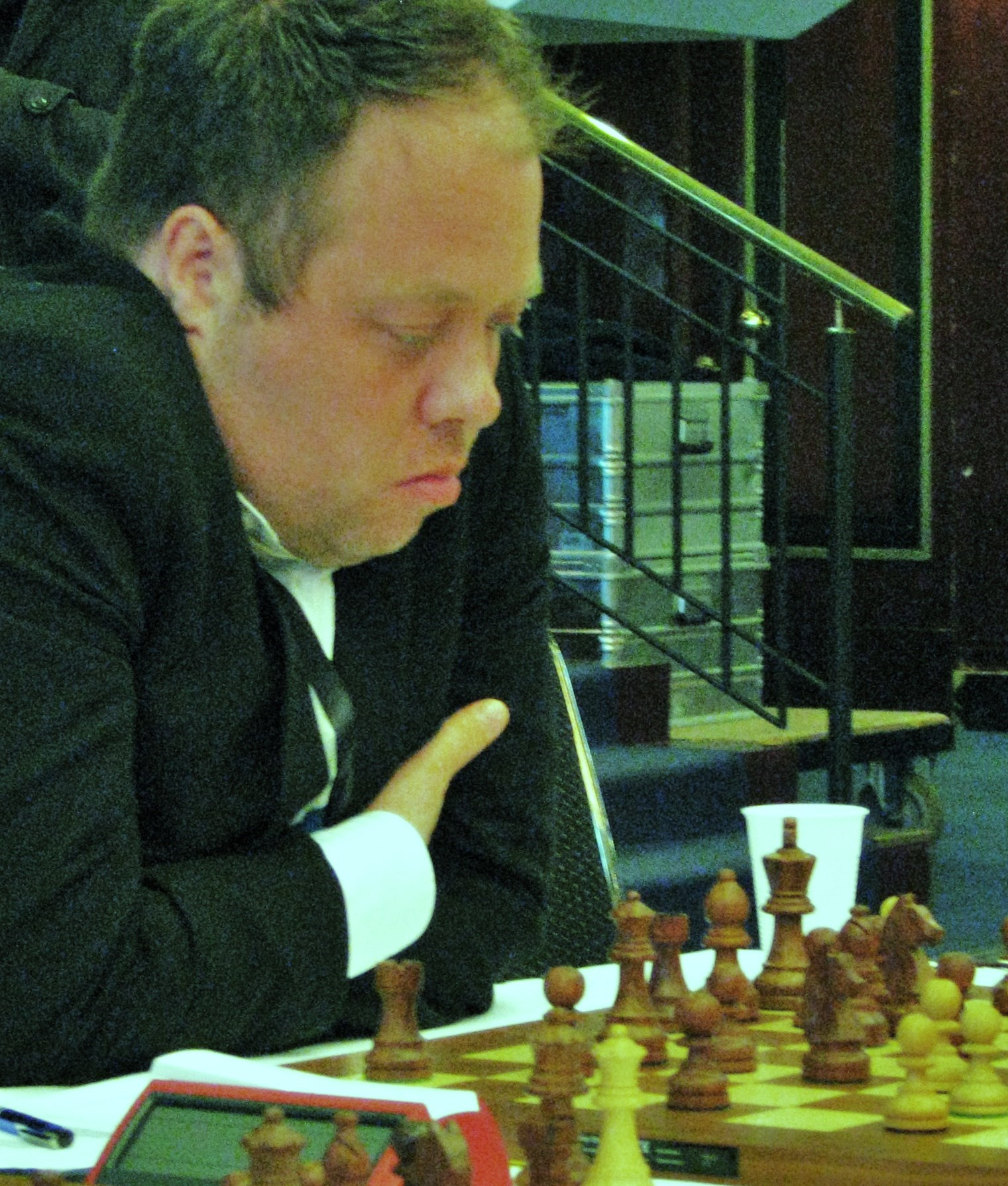 Rainer Buhmann für für den SV 1930 Hockenheim bei der Bundesliga-Finalrunde 2017 in Berlin